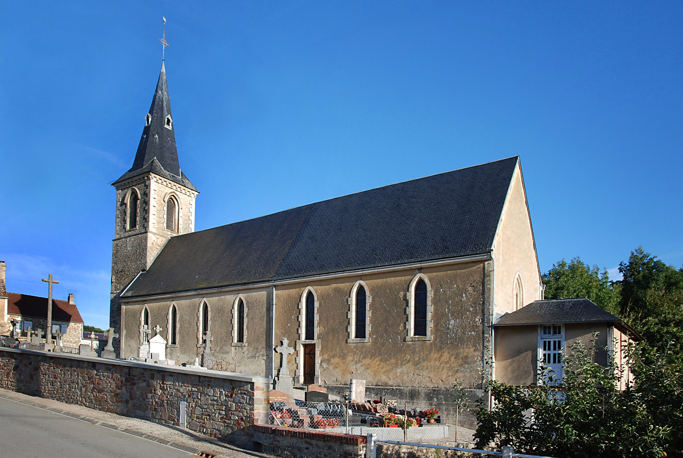 Vignats (Calvados)